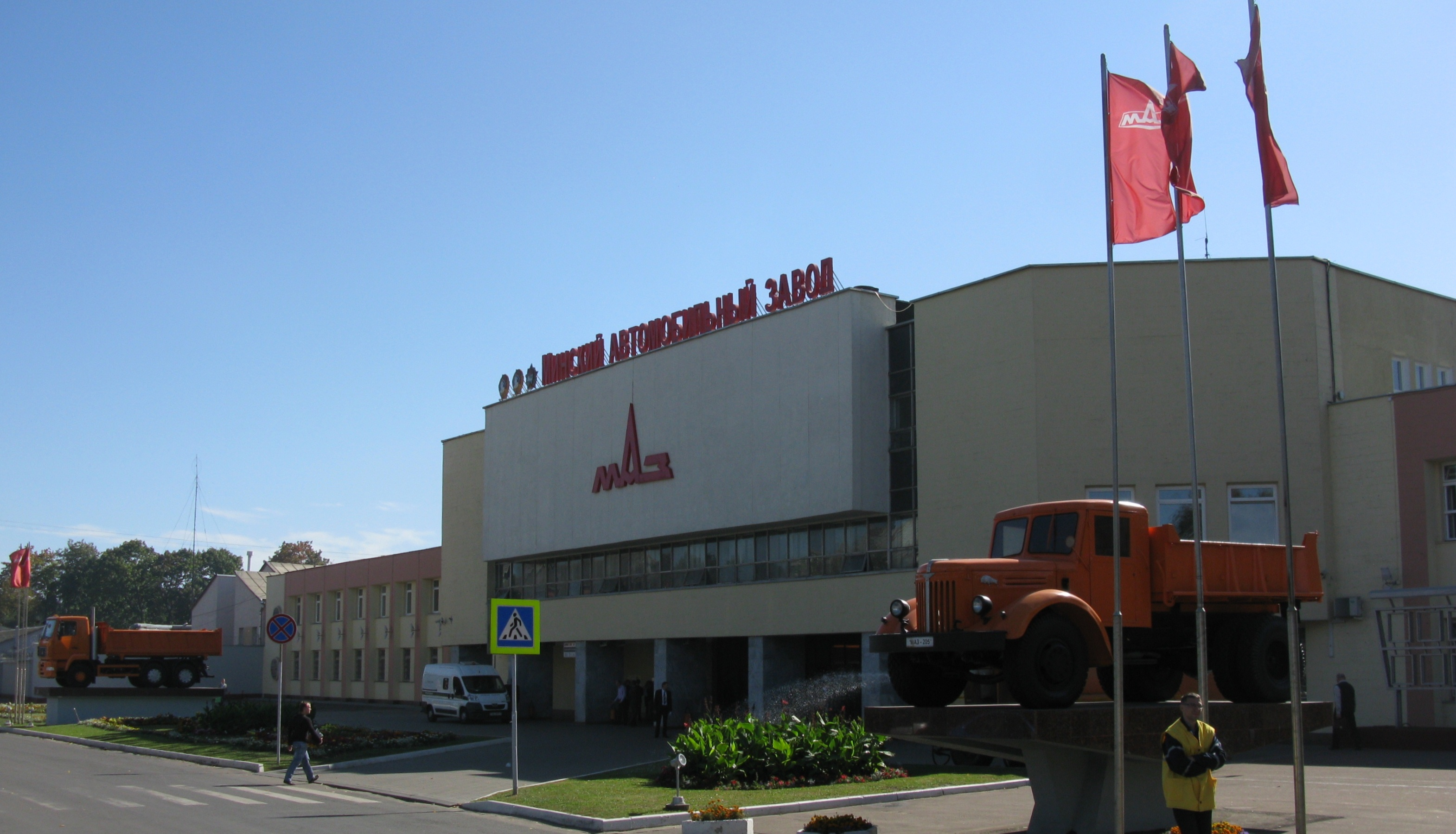 Вид проходной Минского Автомобильного Завода (ул. Социалистическая, 2) со стороны улицы Центральной. Минск, Беларусь.